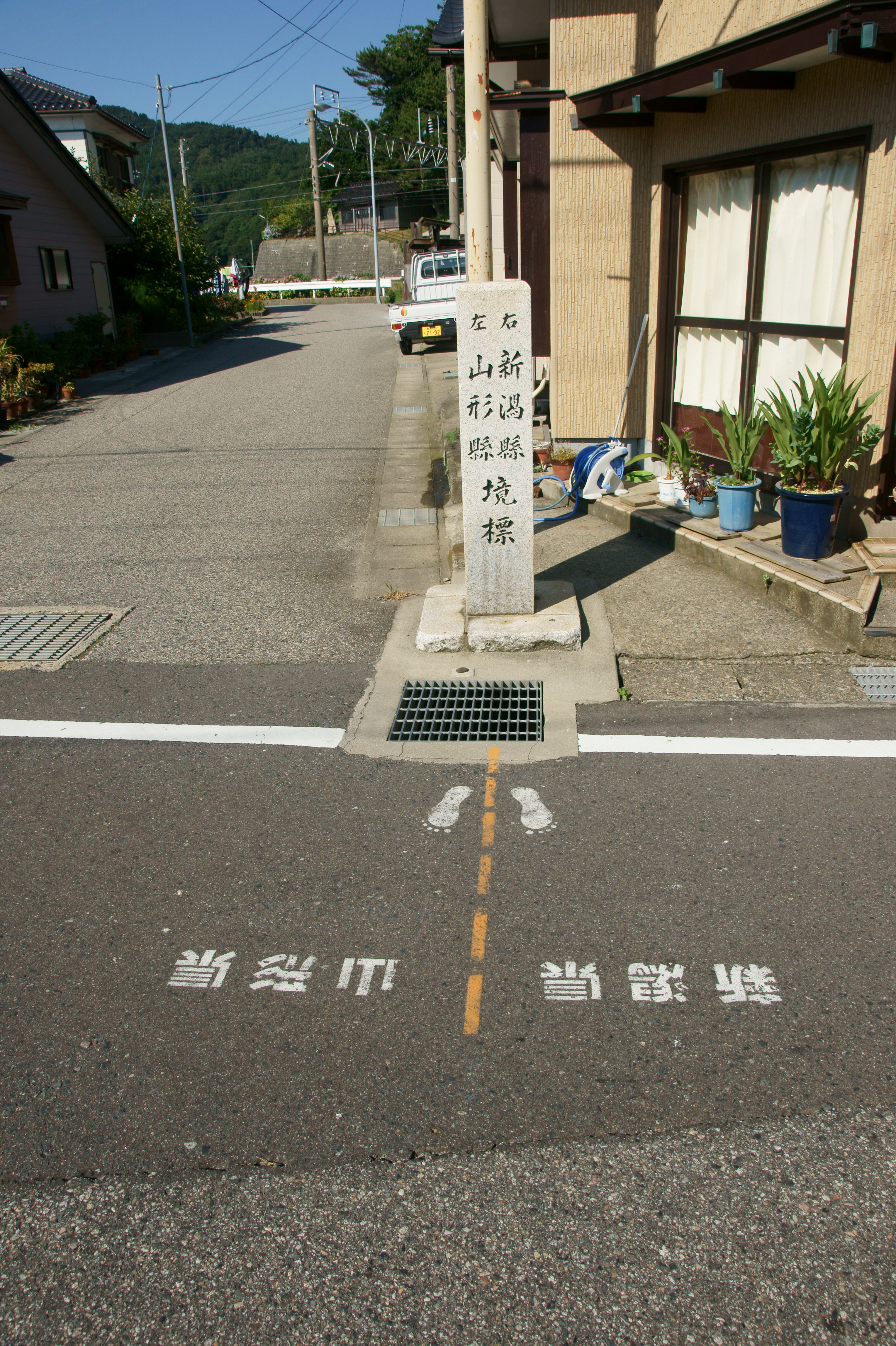 鼠ヶ関県境